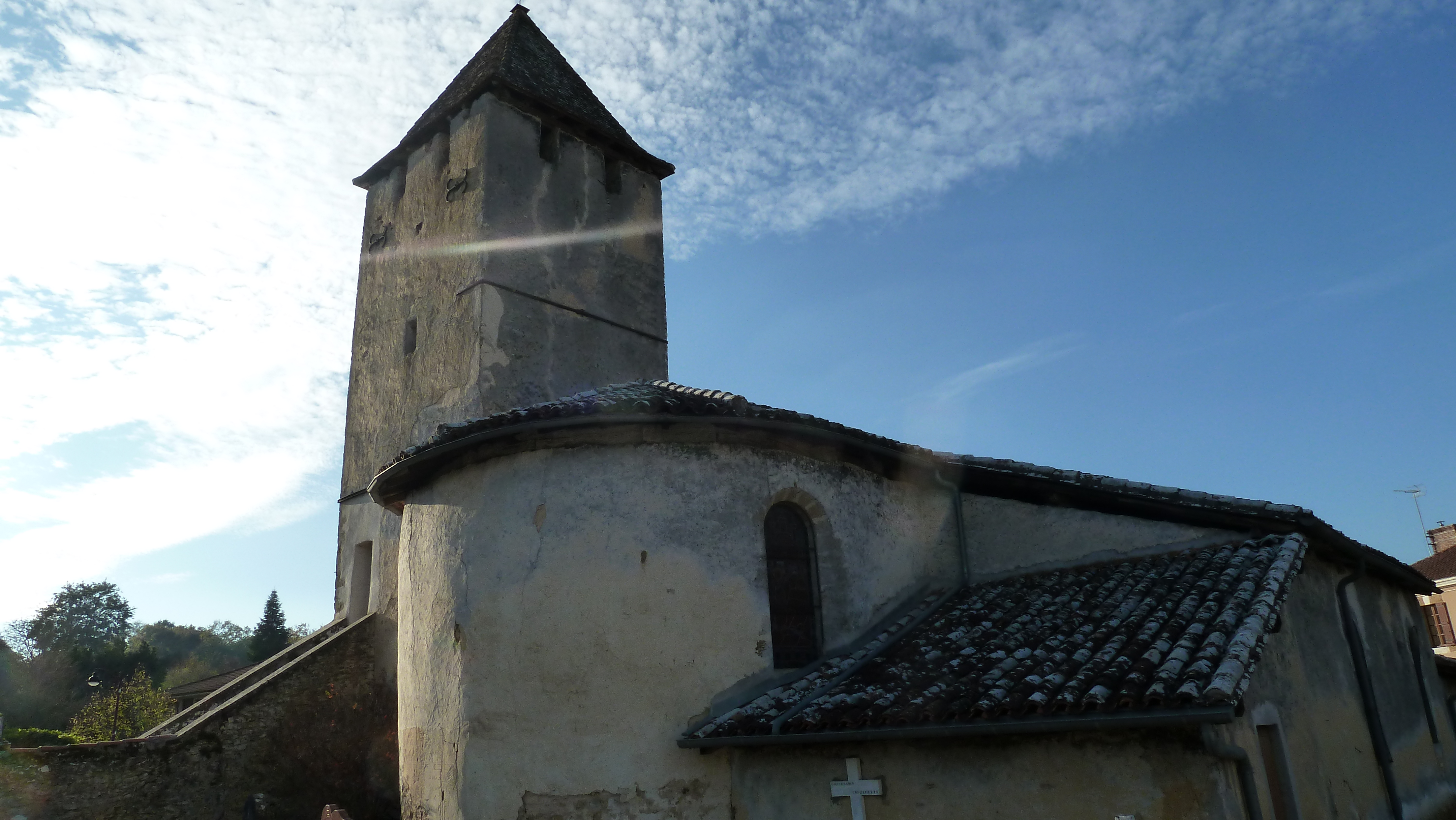 Eglise de Saint Cricq coté cimetière